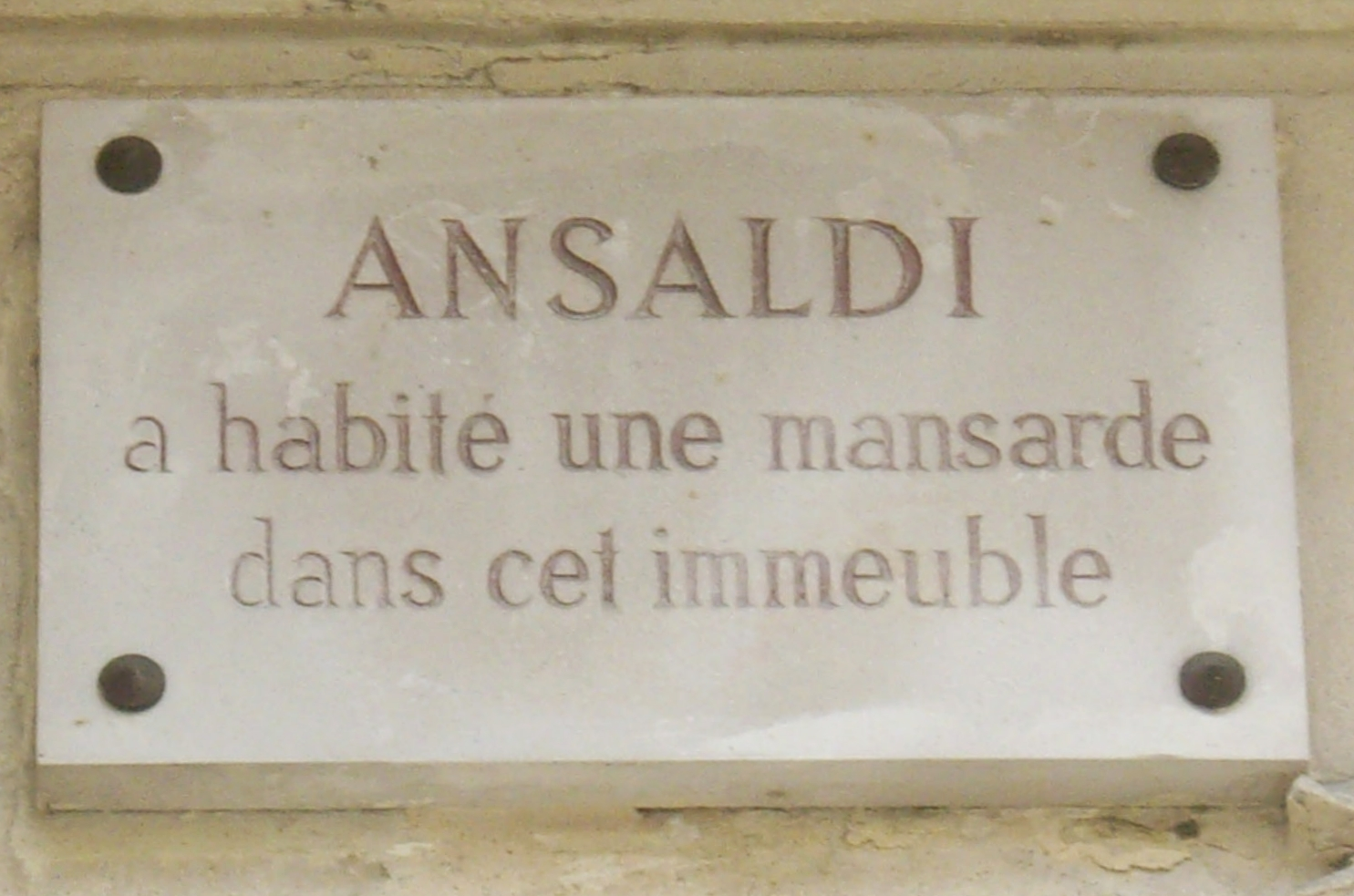 Plaque commémorative, 75 rue La Fayette, Paris 9e. « Ansaldi a habité une mansarde dans cet immeuble. »[Ansaldi à identifier]